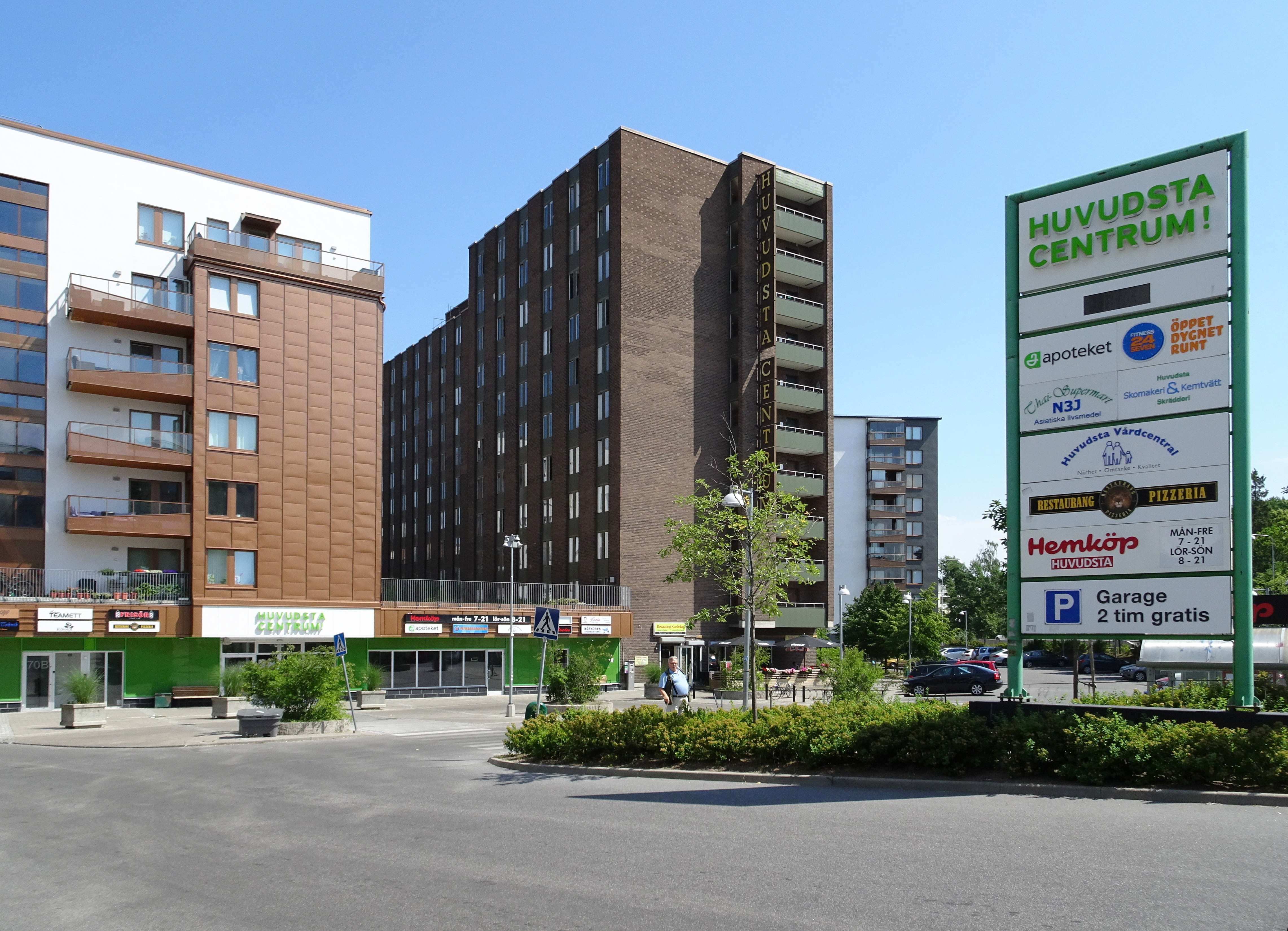 Huvudsta Centrum